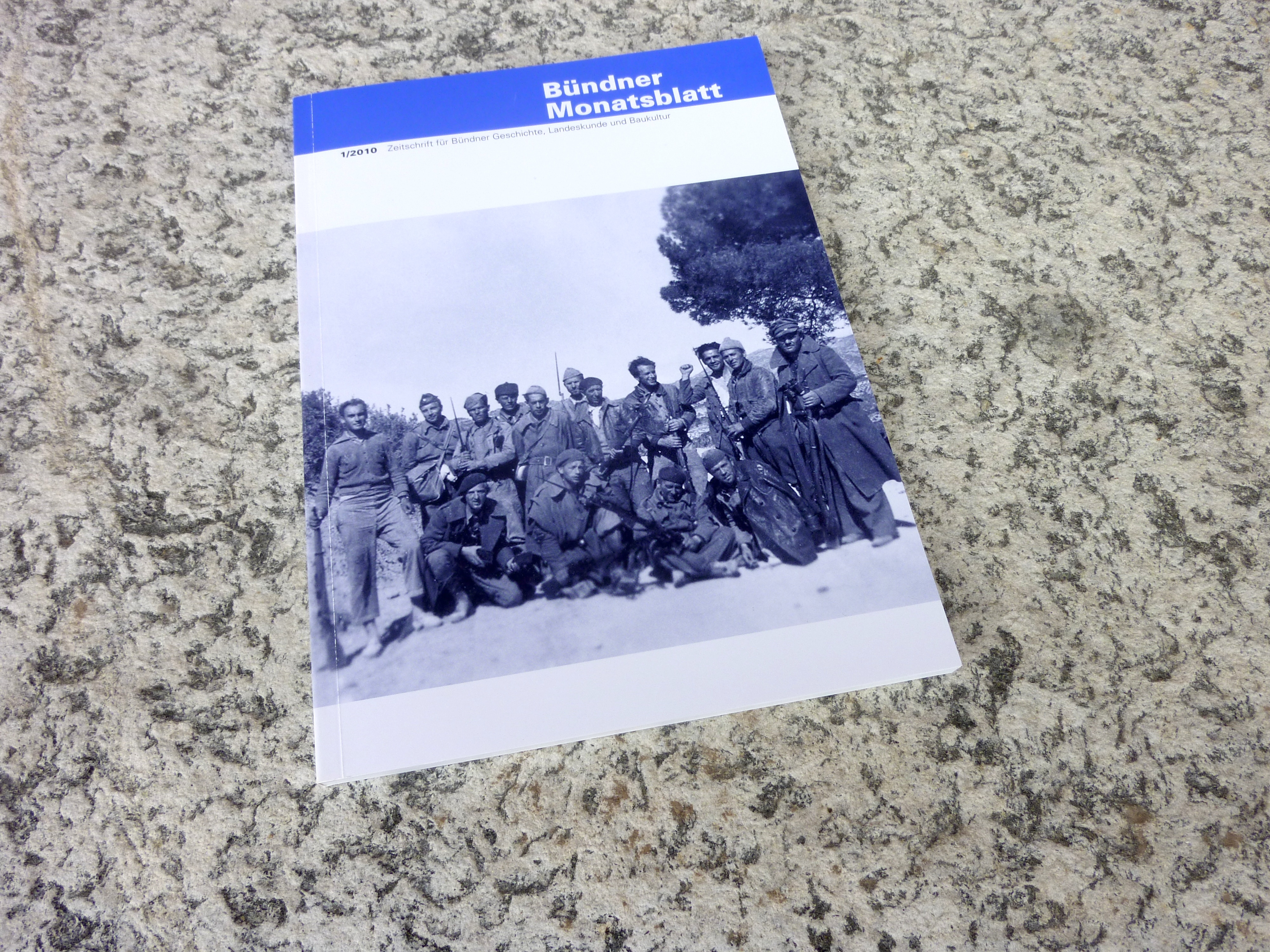 Bündner Monatsblatt1/2010